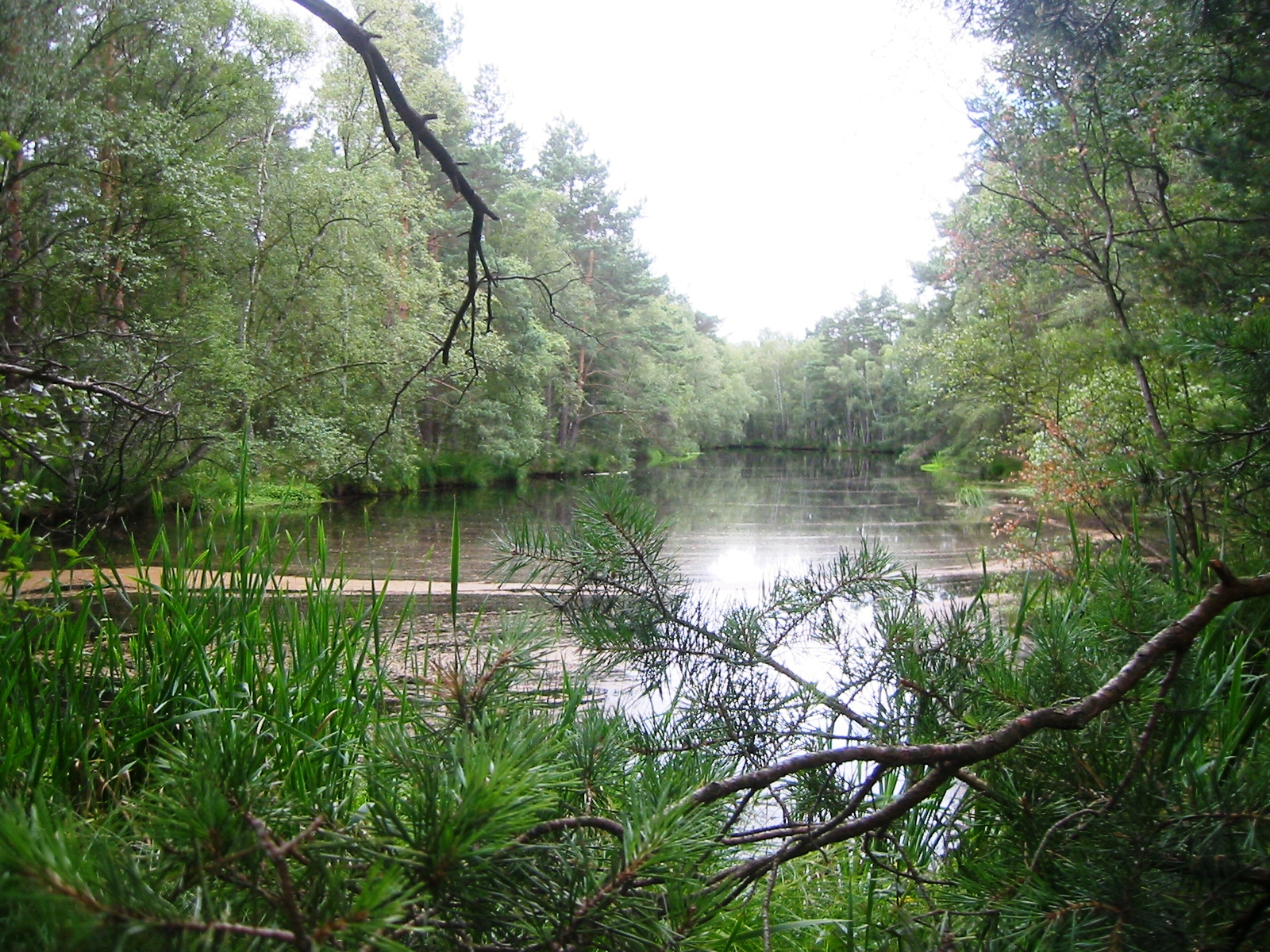 Impressionen vom Naturschutzgebiet Ribnitzer Großes Moor, einem Naturschutzgebiet in Mecklenburg-Vorpommern